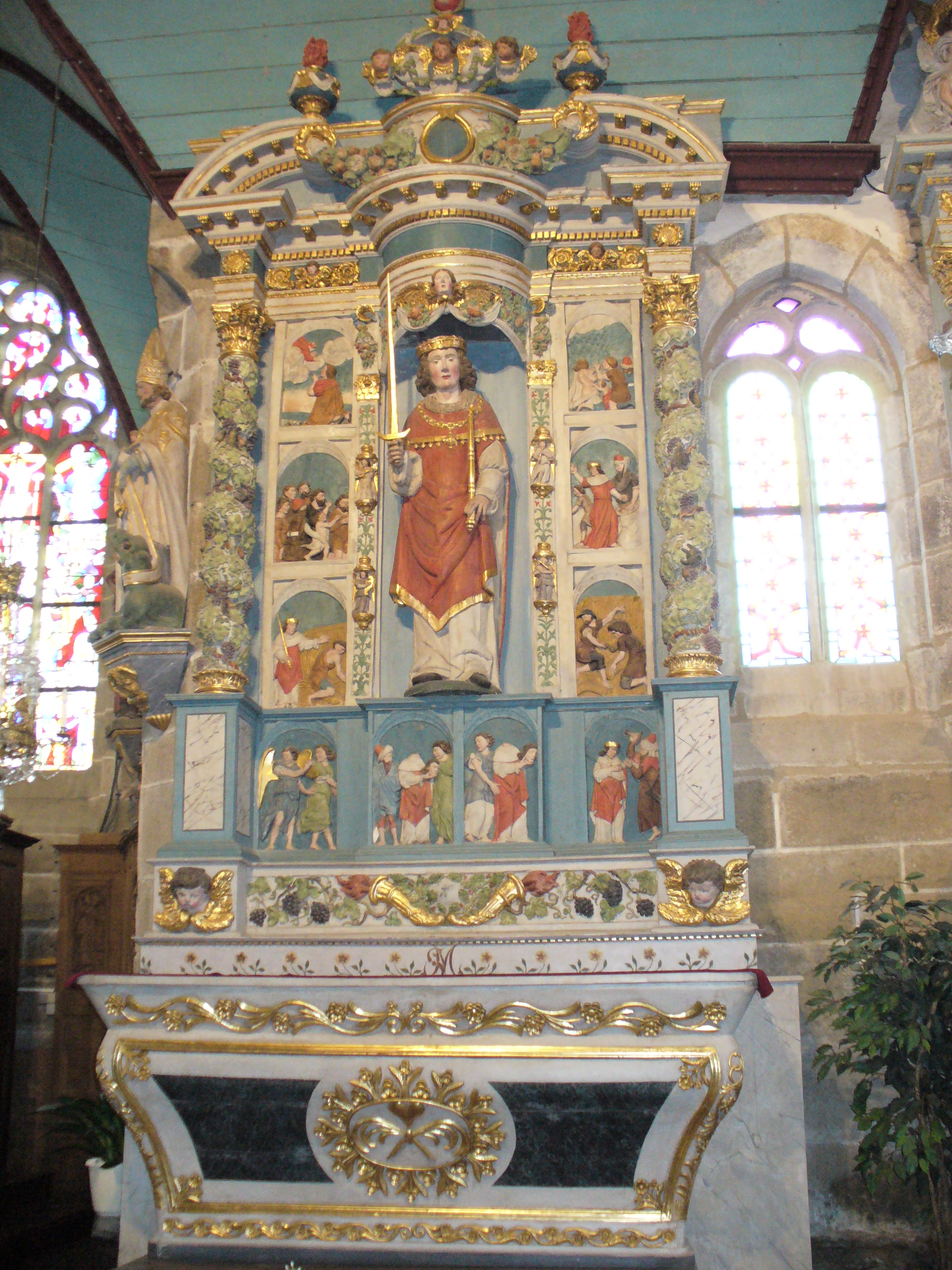 Das Altarbild vom Heiligen Miliau,des Prinzen von Cornouaille-Cornwall und Bretonischer Heiliger.Darunter seinen Kopf in den Händen haltend ,Durch seine Frau Aurelie gestützt-Darstellung verschiedener Episoden seines Lebens-Kirche Eglise Saint Miliau(1600)-Guimiliau-Enclos Paroissal-Umfriedeter Pfarrbezirk